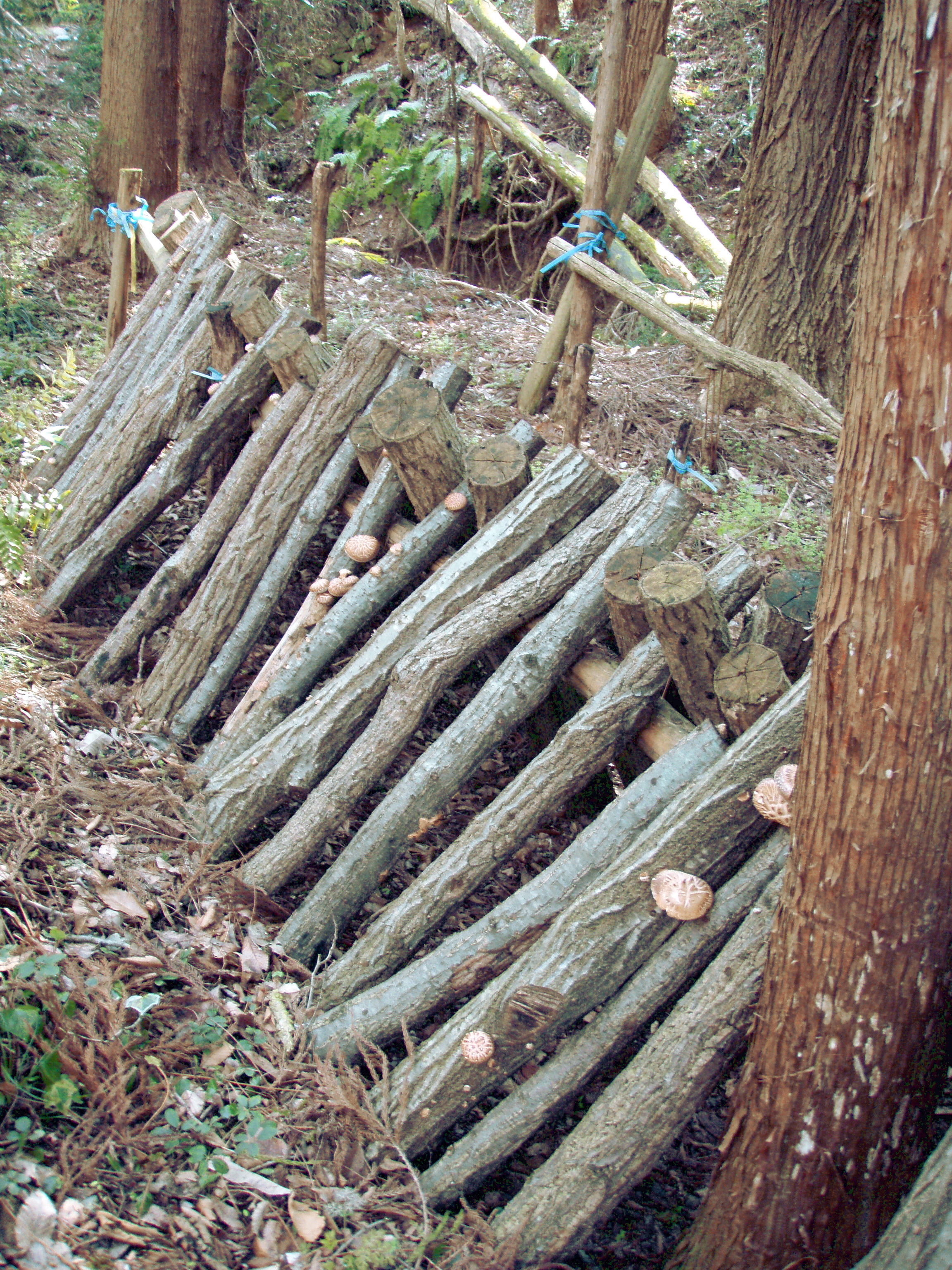 収穫の為に針葉樹林内に立てかけられた原木。